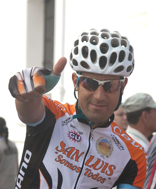 Daniel Díaz, ciclista argentino